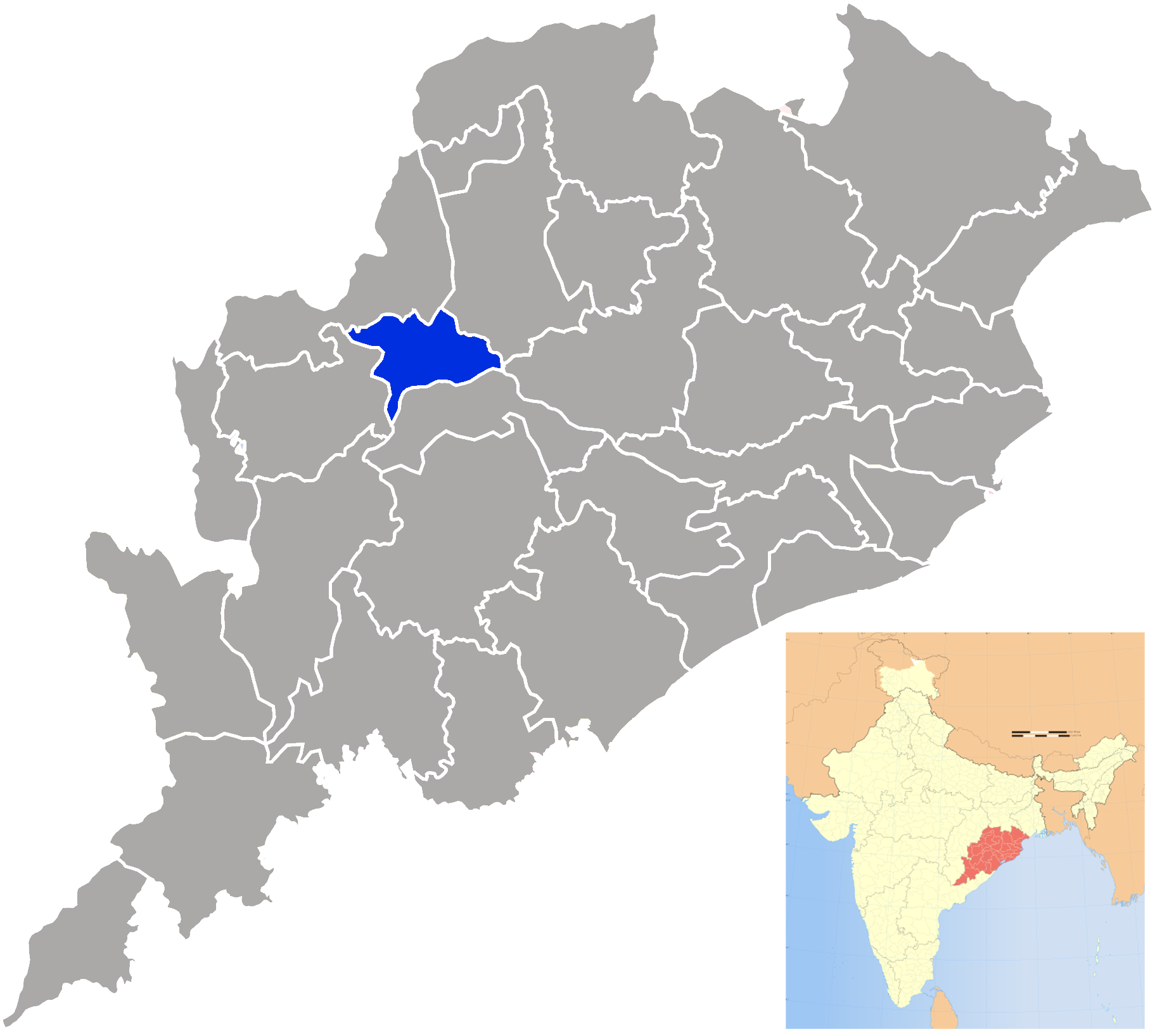 Distrito de Subarnapur en Orissa